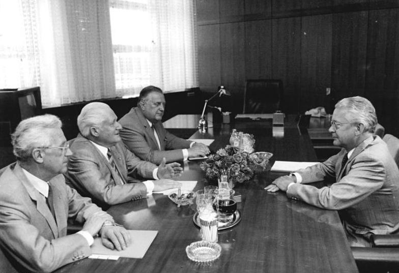 ADN-ZB Settnik 29.6.89 Berlin: Günter Mittag (2.v.l.), Mitglied des Politbüros und Sekretär des ZK der SED, Stellvertreter des Vorsitzenden des Staatsrates der DDR, empfing den Präsidenten des Deutschen Industrie- und Handelstages (DIHT) der BRD, Hans-Peter Stihl (r.), zu einem Gespräch. Weiter nahmen teil: Gerhard Beil (l.), Minister für Außenhandel, Alexander Schalck-Golodkowski (3.v.l.), Staatssekretär im MAH.